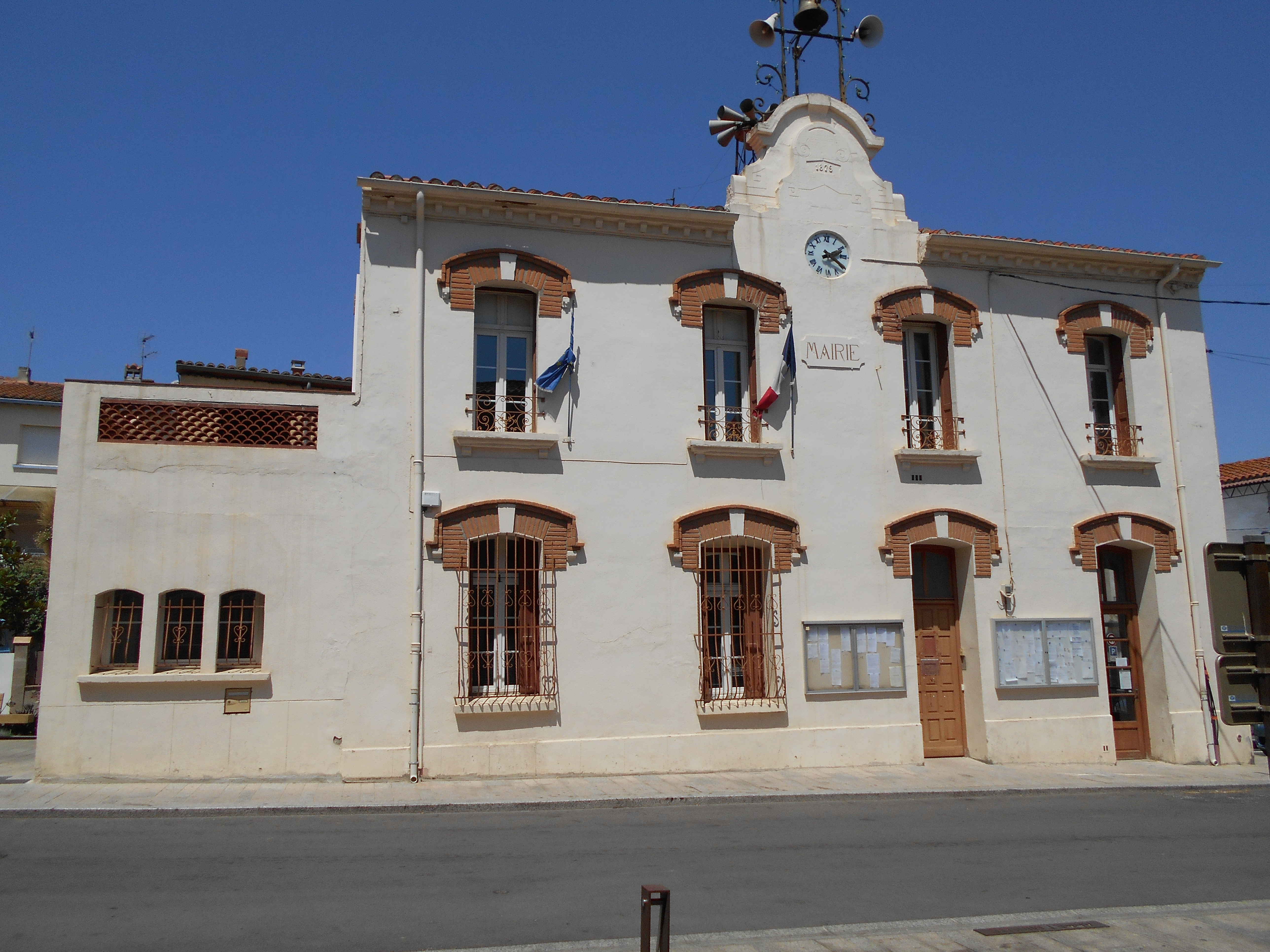 La Casa deñ Comú de Forques